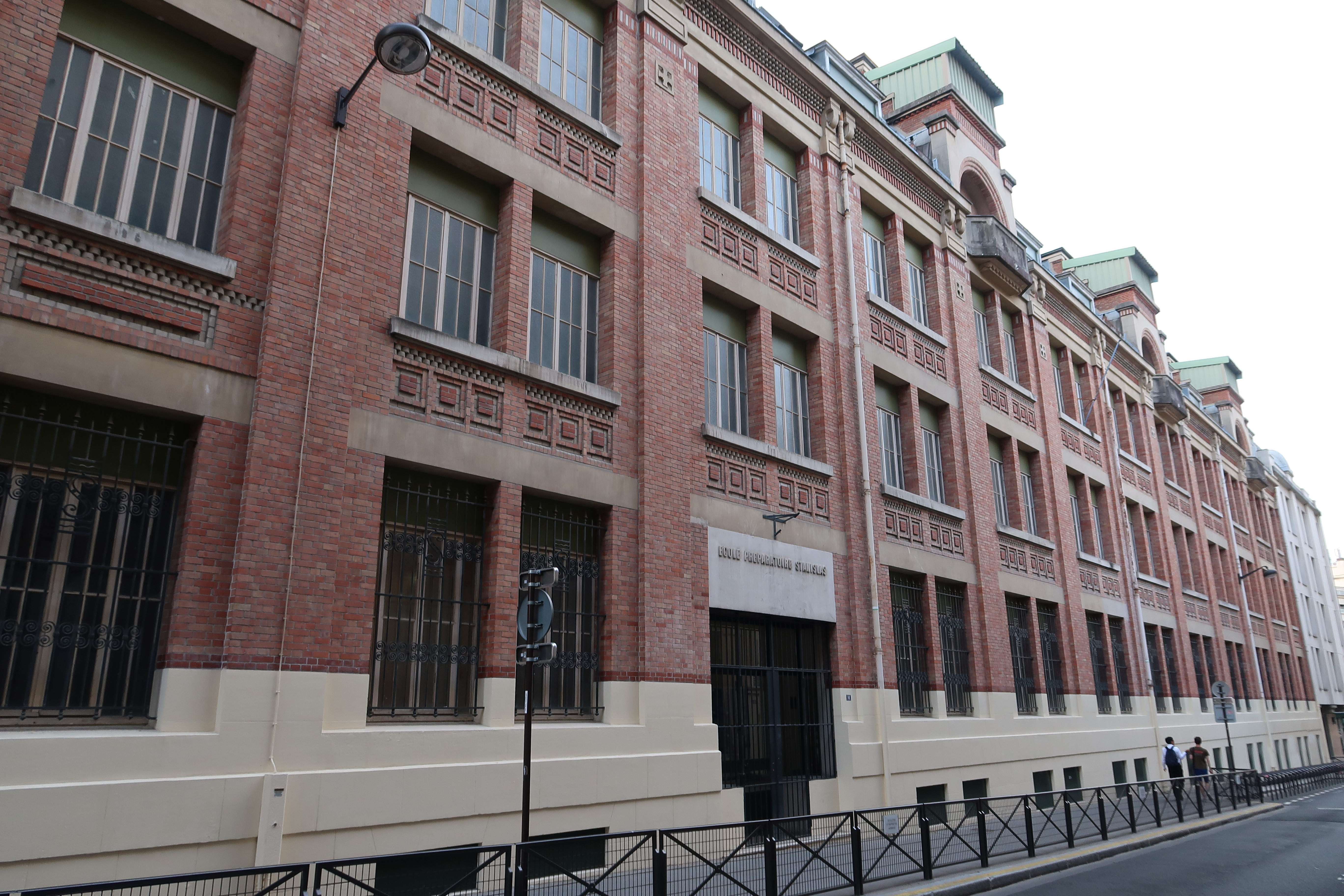 Collège Stanislas, rue du Montparnasse (Paris 6e).